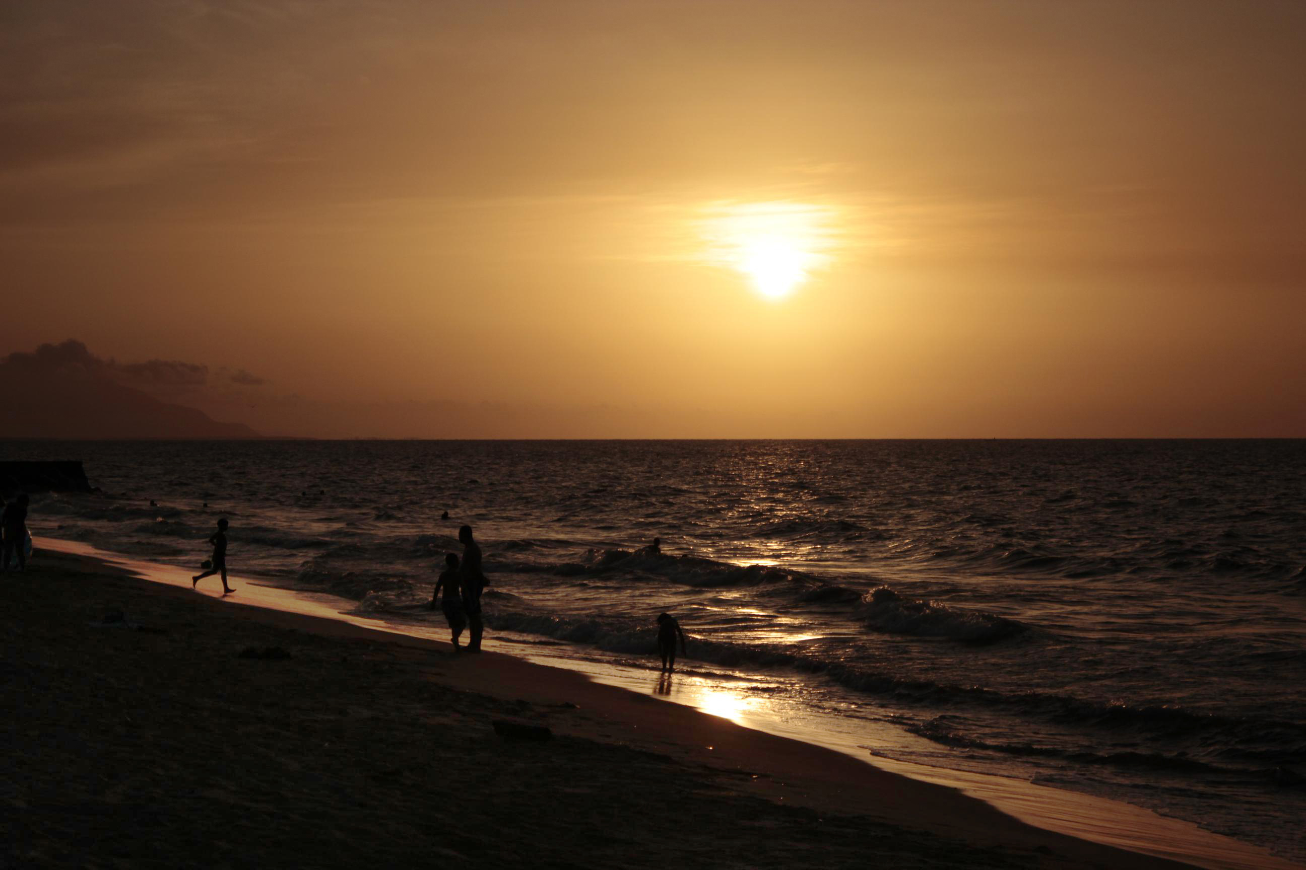 Una foto durante una de mis interminables vacaciones en la playa de Píritu, en el estado Anzoátegui, justo antes de que el sol se pusiera.